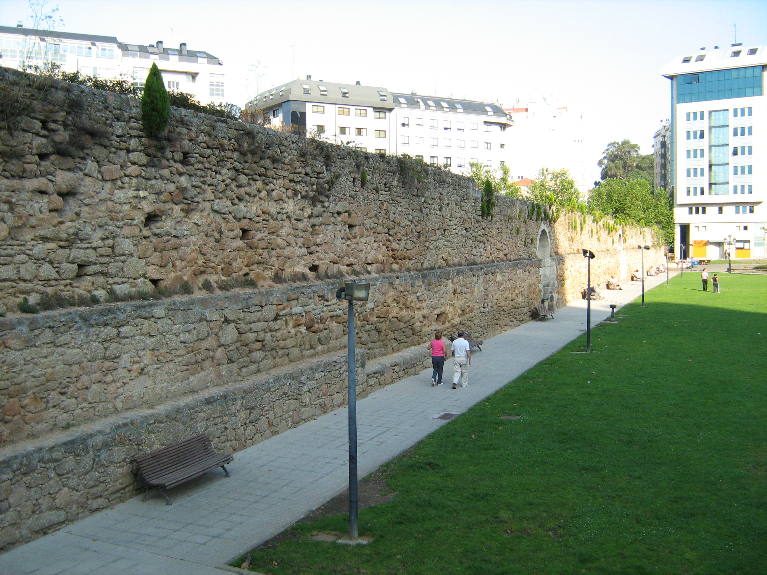 Acueduto do Paseo das Pontes, na Coruña